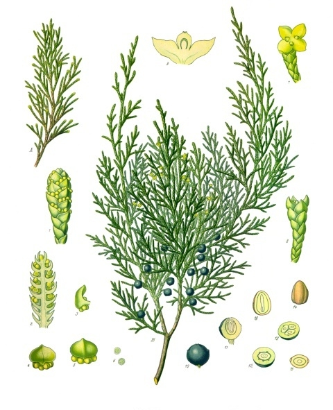 Sadebaum. A männlicher Blüthenzweig, natürl. Grösse; B Fruchtzweig, desgl.; 1 männliche Blüthe, vergrössert; 2 dieselbe im Längsschnitt, desgl.; 3, 4, 5 Staubgefässe von verschiedenen Seiten, desgl.; 6 Pollen, desgl.; 7, 8 weibliche Blüthe, desgl.; 9 dieselbe im Längsschnitt, mit 2 Fruchtschuppen, desgl.; 10 reife Beere, desgl.; 11 dieselbe im Längsschnitt, desgl.; 12, 13 dieselbe im Querschnitt, 1- und 3 sämig, desgl.; 14 Same, desgl.; 15, 16 derselbe im Quer- und Längsschnitt, desgl.